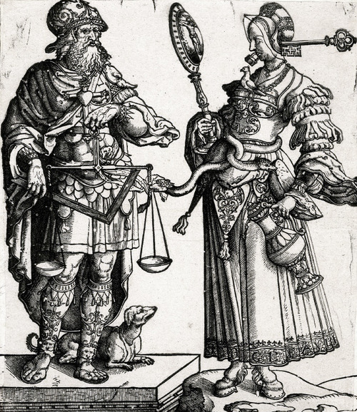 Cornelis Anthonisz. Allegory of the wise man and the wise woman (c. 1530).jpg: гравюра